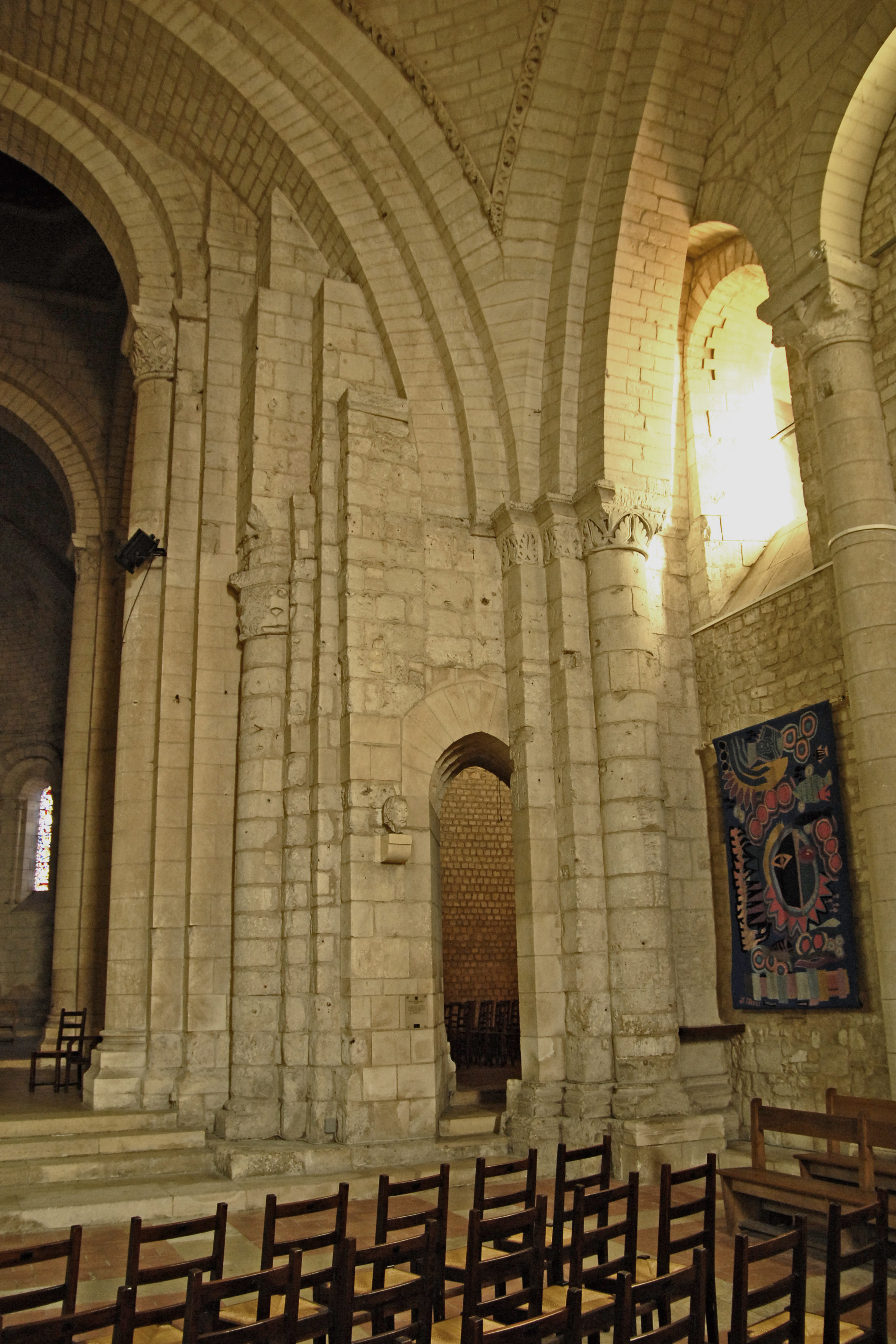 Abbaye aux Dames Saintes, Abteikirche, Schiff Südseite (vorne)